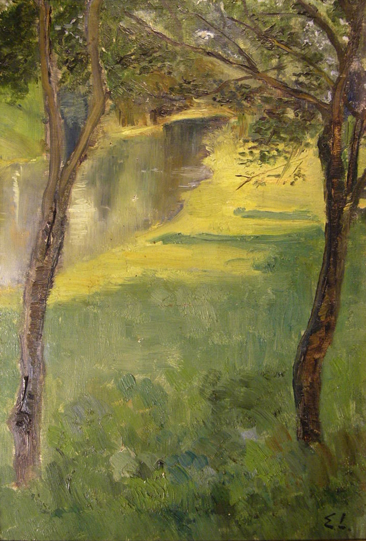 Flussufer wie Max Liebermann